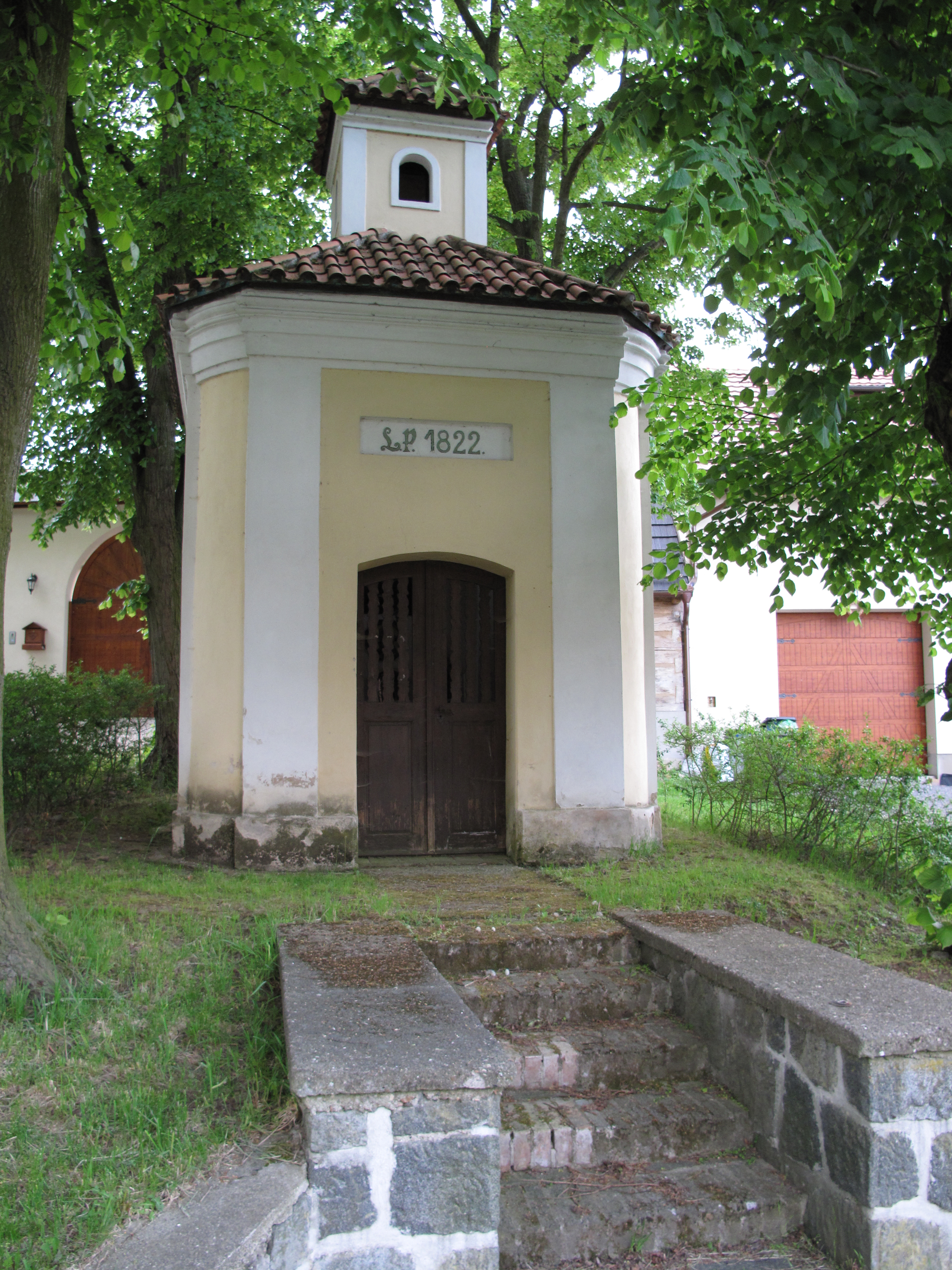 Kaplička v Nesvačilech. Okres Beroun, Česká republika.